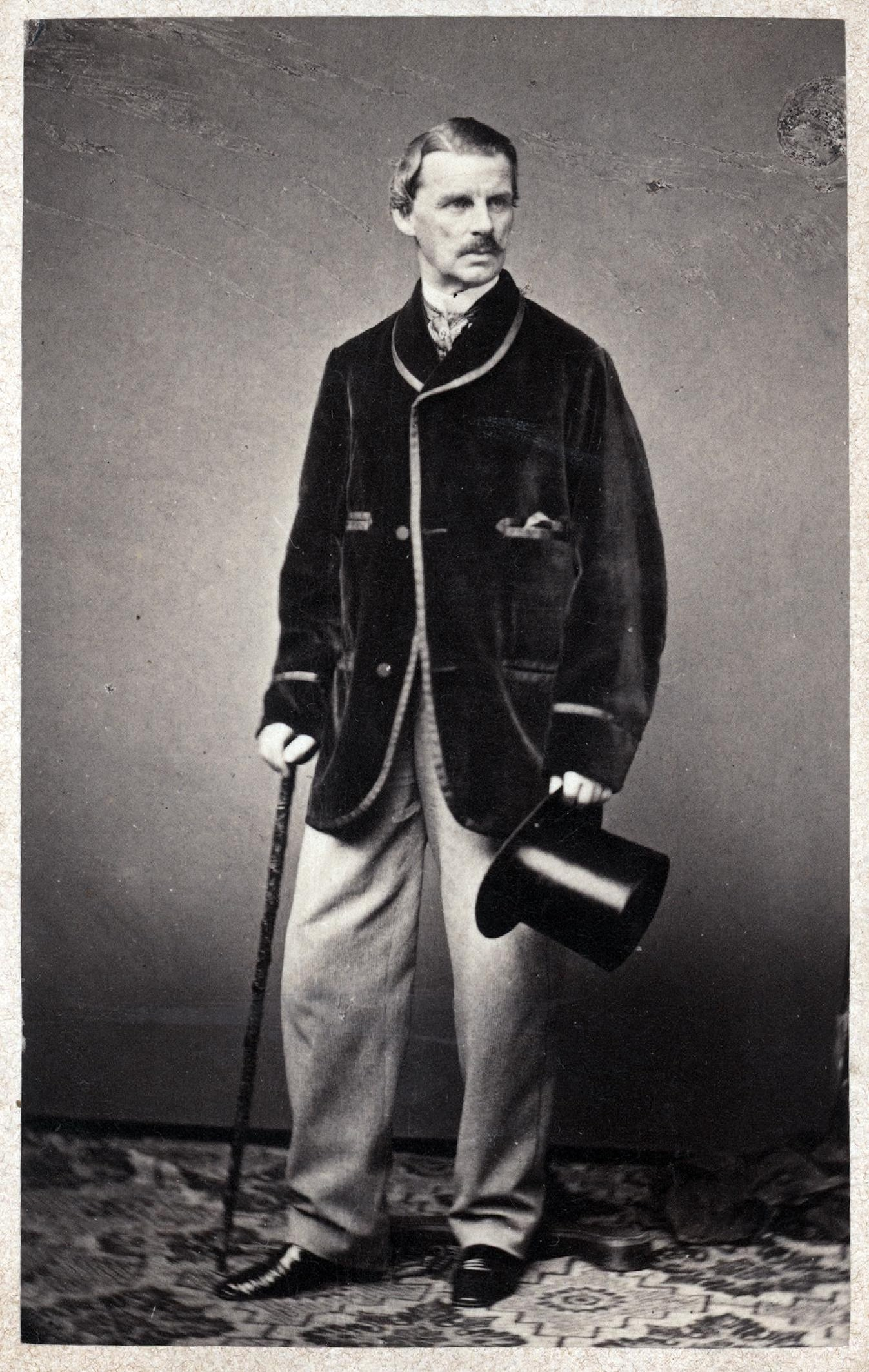 Max in Bayern